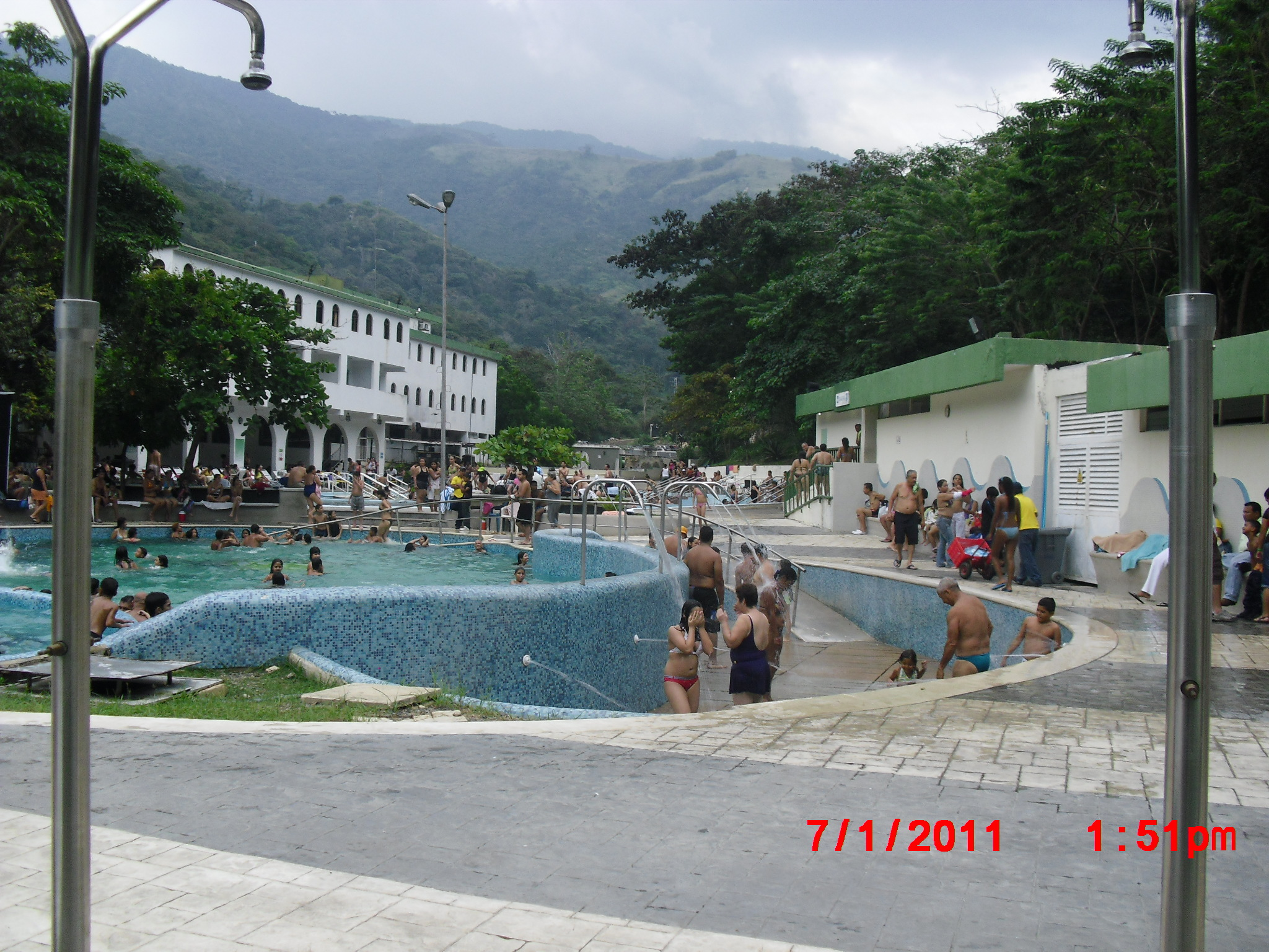 Las Trincheras, Carabobo, Venezuela